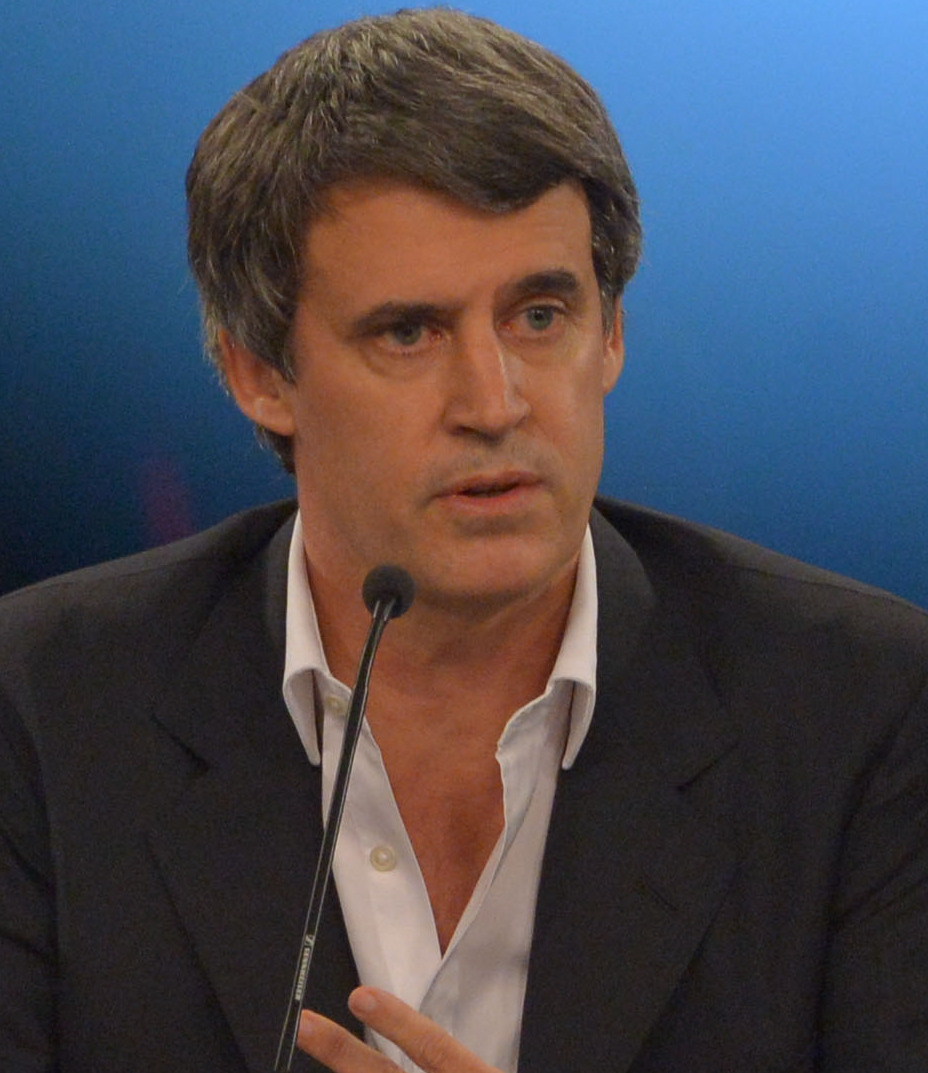 El ministro de Hacienda y Finanzas, Alfonso Prat Gay, anunció hoy un acuerdo con los acreedores más duros para cancelar la deuda soberana, un logro que le permitirá a la Argentina comenzar a salir del default y ponerse “en la línea de largada para el crecimiento”. “Por primera vez en 15 años Argentina empieza a salir definitivamente del default”, subrayó Prat Gay en una conferencia de prensa que brindó junto al vicejefe de Gabinete, Mario Quintana; el secretario de Finanzas, Luis Caputo, y el subsecretario de Financiamiento, Santiago Bausili.